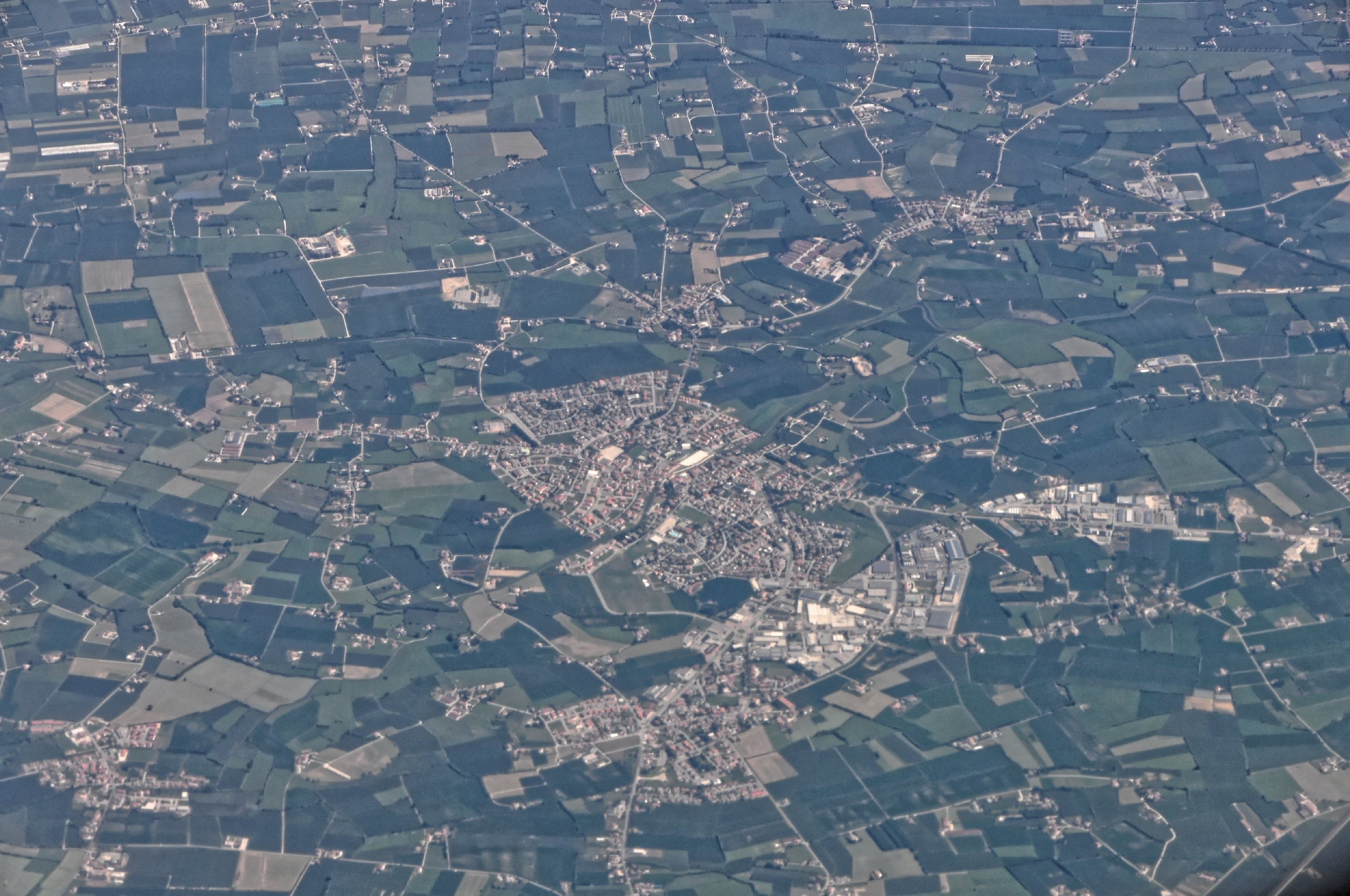 Bilder vom Flug -Rom-Düsseldorf-Hamburg 2013 Dieses Foto entstand in Zusammenarbeit mit Stadtbesichtigungen.de Die Seiten Stadtbesichtigungen.de, der dazugehörige Reise Blog sowie die Facebookseite: Stadtbesichtigungen Rom dürfen dieses Bild für Ihre Veröffentlichungen ohne den Hinweis auf Wikipedia, Commons bzw der Lizenz verwenden. Die Verantwortlichen habe von mir (Ra Boe) die Originaldaten zur freien Verfügung übermittelt bekommen.